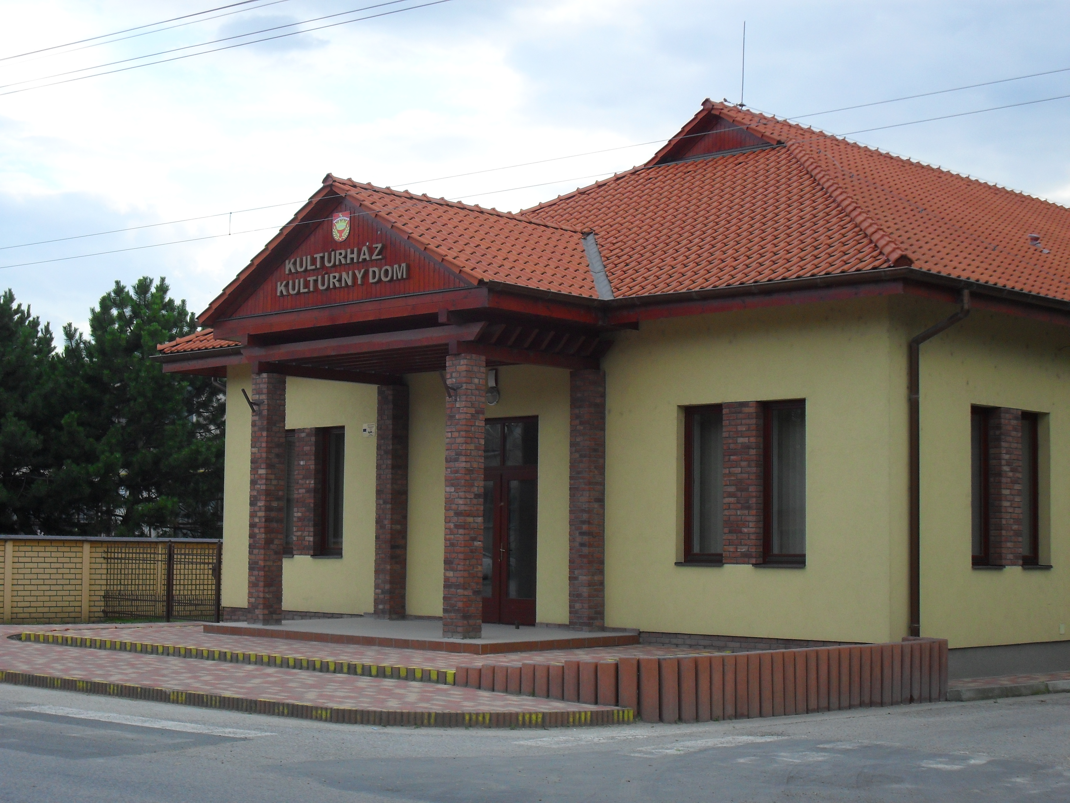 Lakszakállas - kultúrház